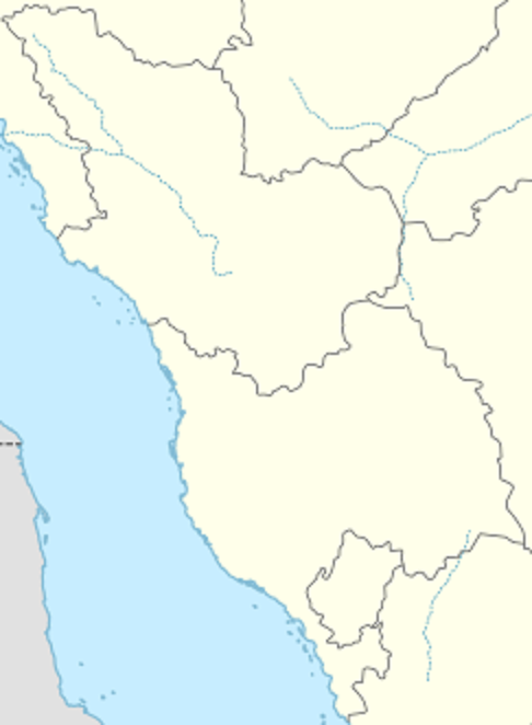 Хиджаз